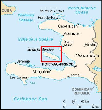 De ligging van het eiland Île de la Gonâve bij Haïti. Dit is een bewerking die ik zelf gemaakt heb van een kaartje uit het CIA World Factbook.